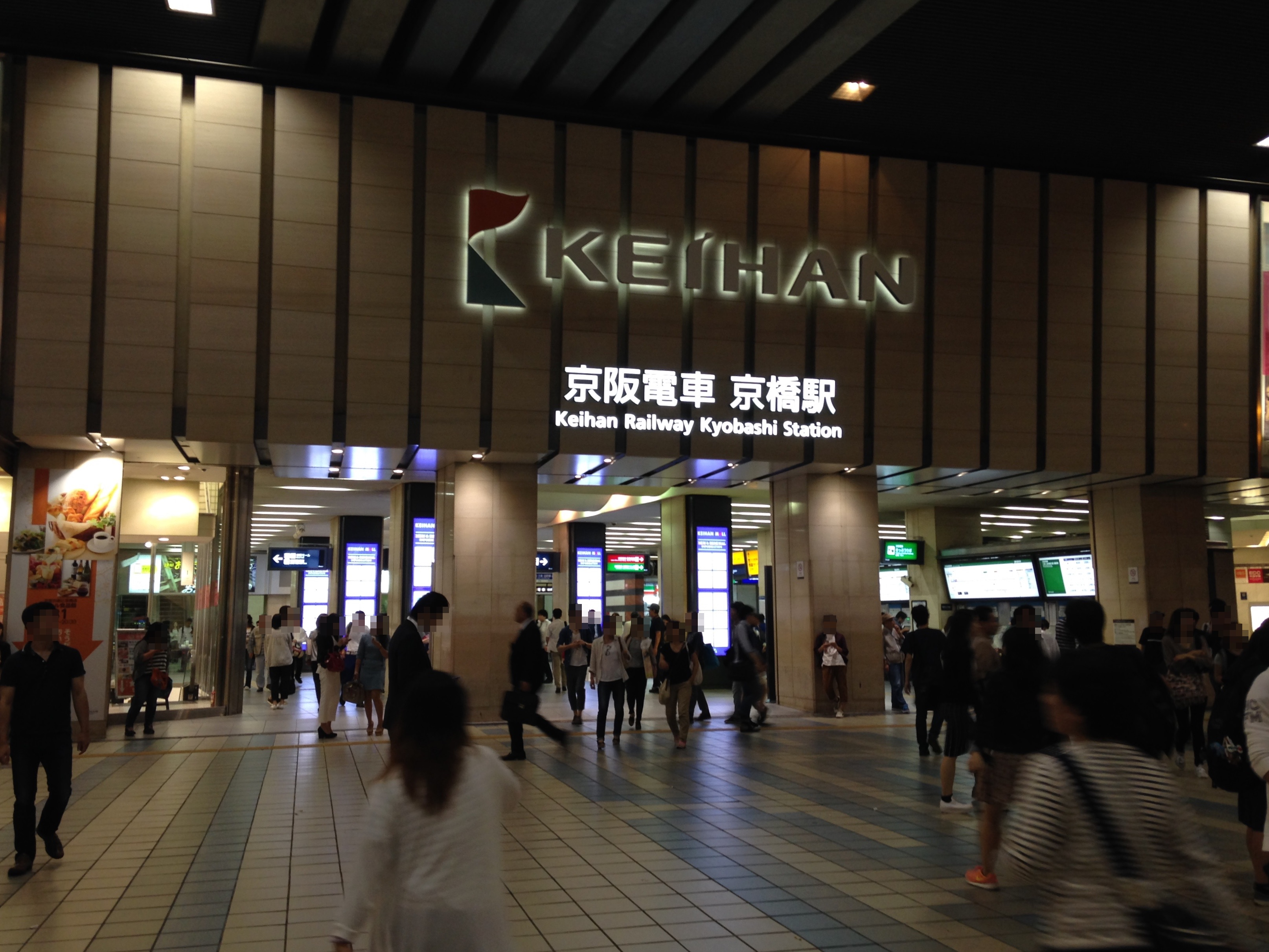 京阪京橋駅